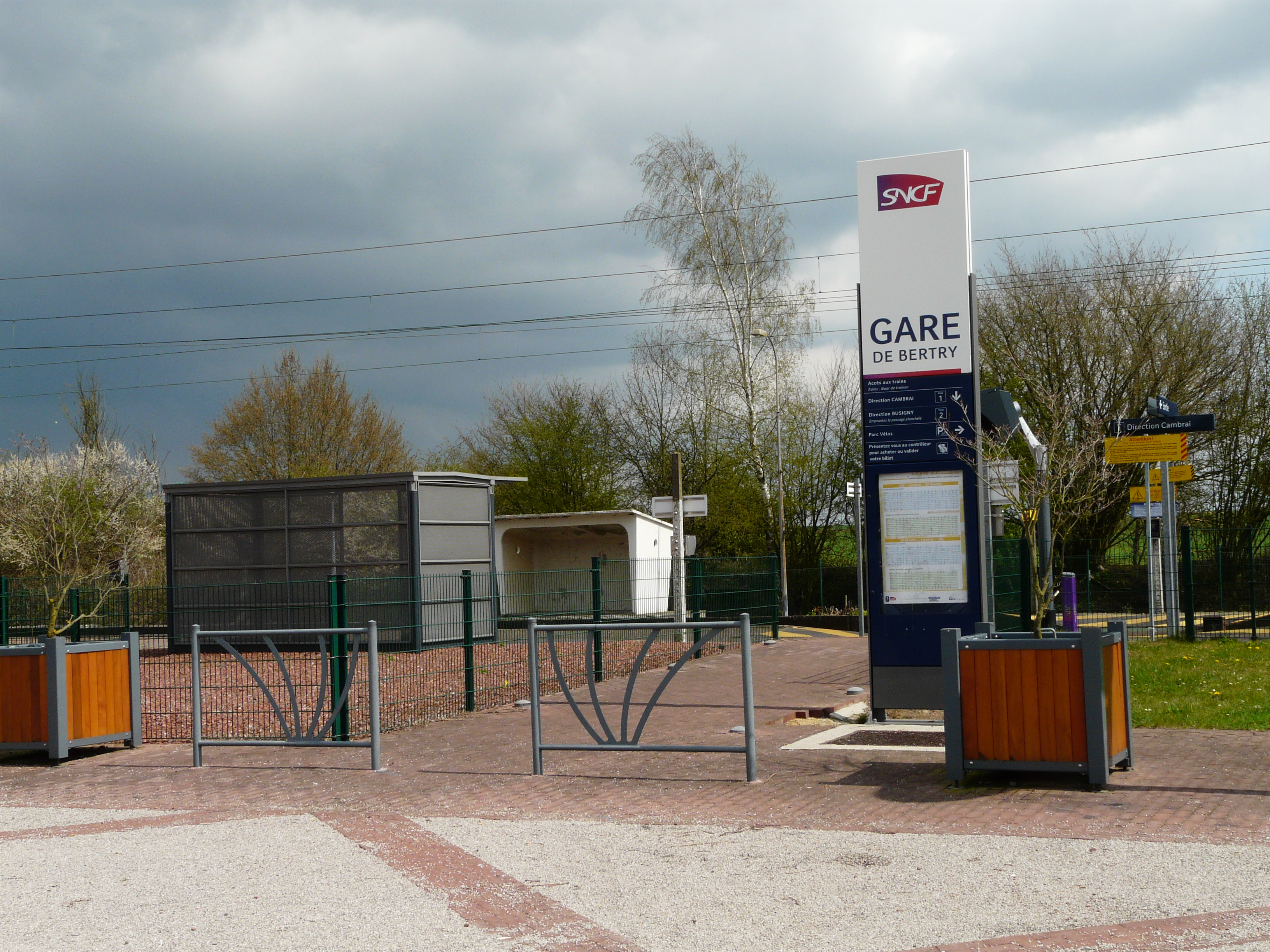 La gare SNCF de Bertry (Nord)